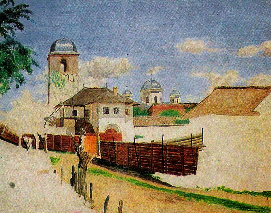 Ion D. Negulici - Peisaj din Câmpulung-casa natală şi Mănăstirea Negru Vodă / Biserică din Câmpulung, ulei pe pânză, Muzeul Naţional de Artă al României, Bucureşti